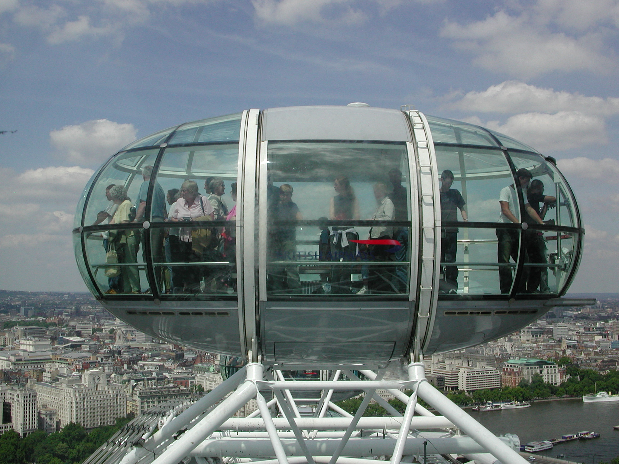 moderner Lagerungsmechanismus bei einer Kabine des London Eye. Kabine mit Lagerungsmechanismus.